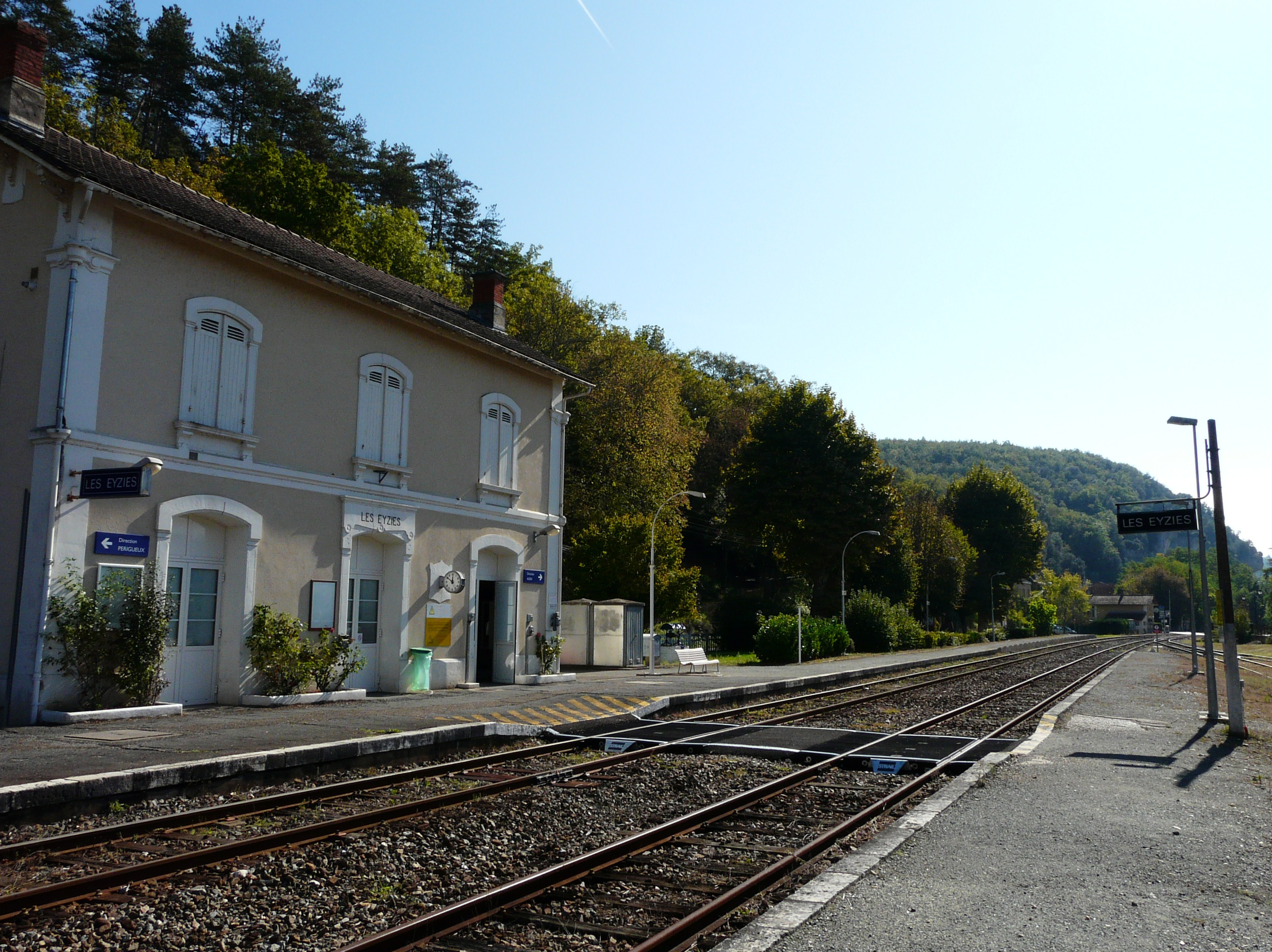 Les voies en gare des Eyzies, Les Eyzies-de-Tayac-Sireuil, Dordogne, France. Vue prise en direction d'Agen.